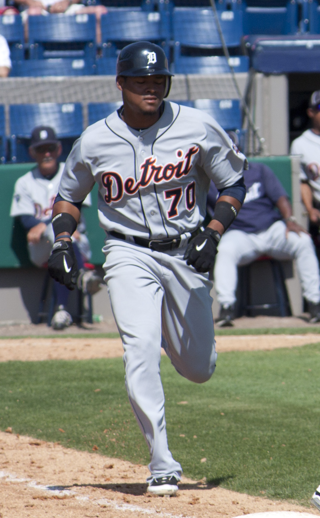 Argenis Díaz